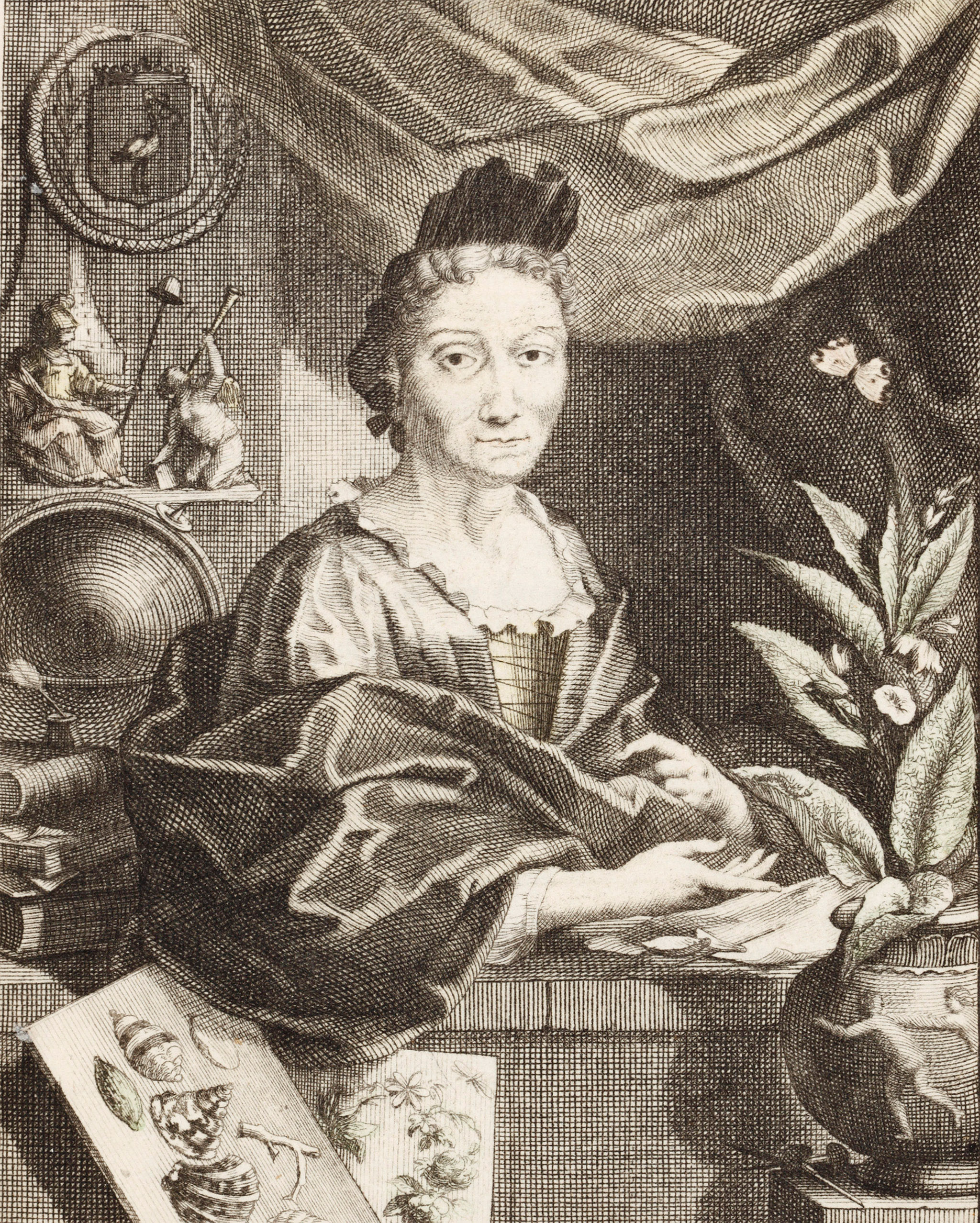 Portrait von Maria Sibylla Merian (1647–1717), nach Georg Gsell; aus der lateinischen Ausgabe von Der Raupen wunderbare Verwandelung und sonderbare Blumennahrung.